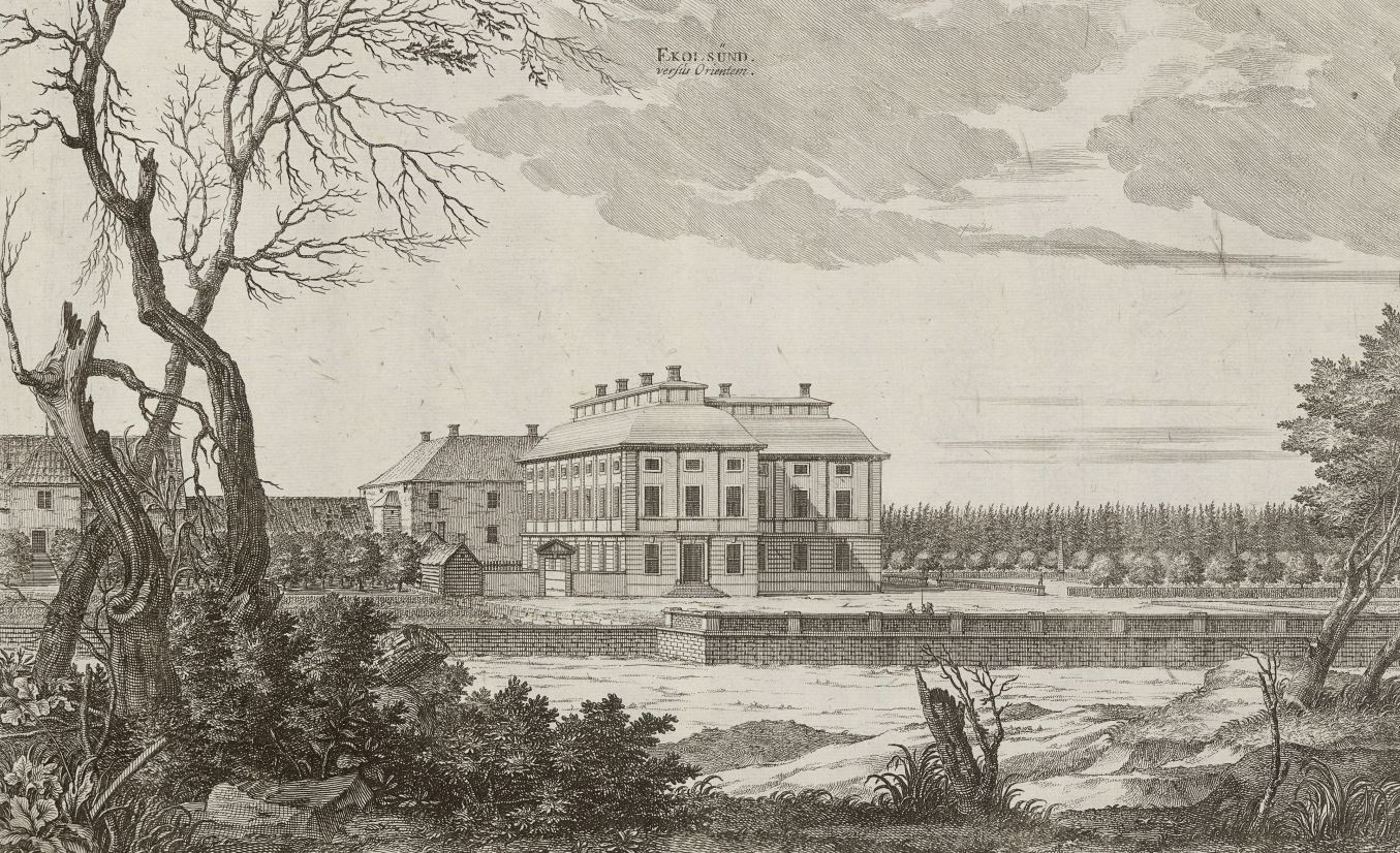 Ekolsunds slott i Sueciaverket. Swidde, Willem, ca 1660-1697 (Gravör) Dahlbergh, Erik, 1625-1703 (Kommissarie)